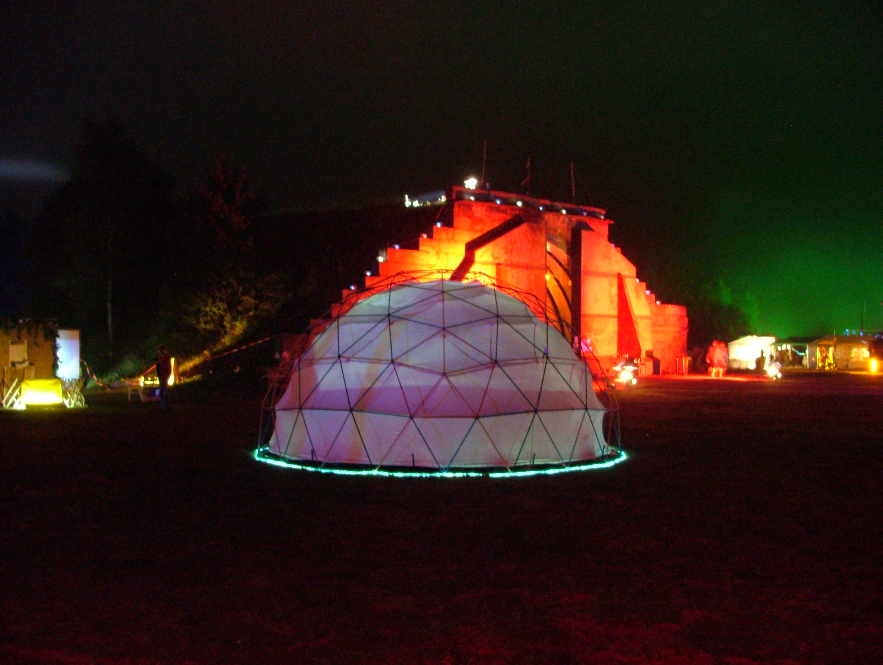 Nächtliche Stimmung beim Chaos Communication Camp in Finowfurt, 2007